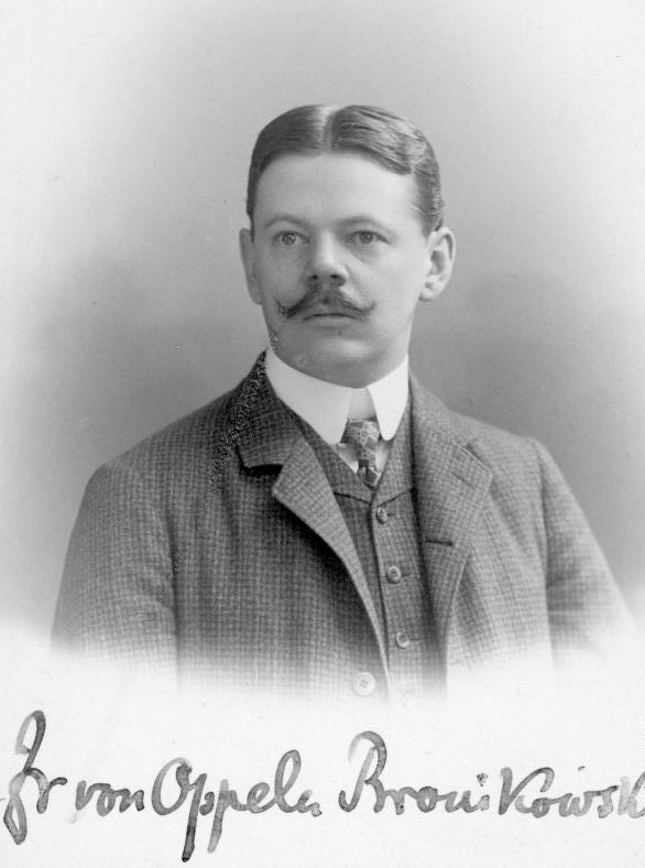 Friedrich von Oppeln-Bronikowski Abgebildete Personen: Oppeln-Bronikowski, Friedrich von: Schriftsteller, Deutschland (GND 117136018)